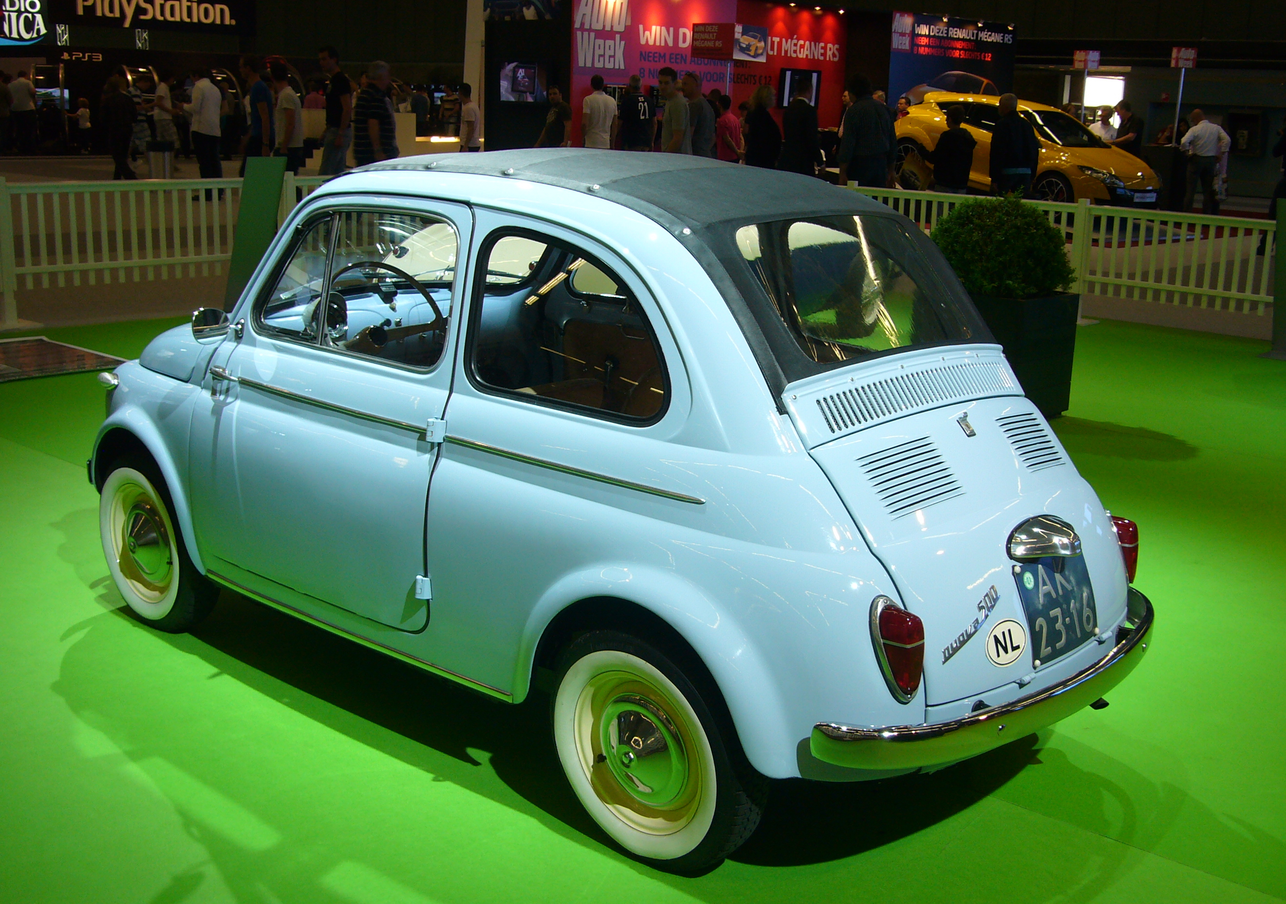 AutoRAI Amsterdam 2011 - Origineel Nederlands.